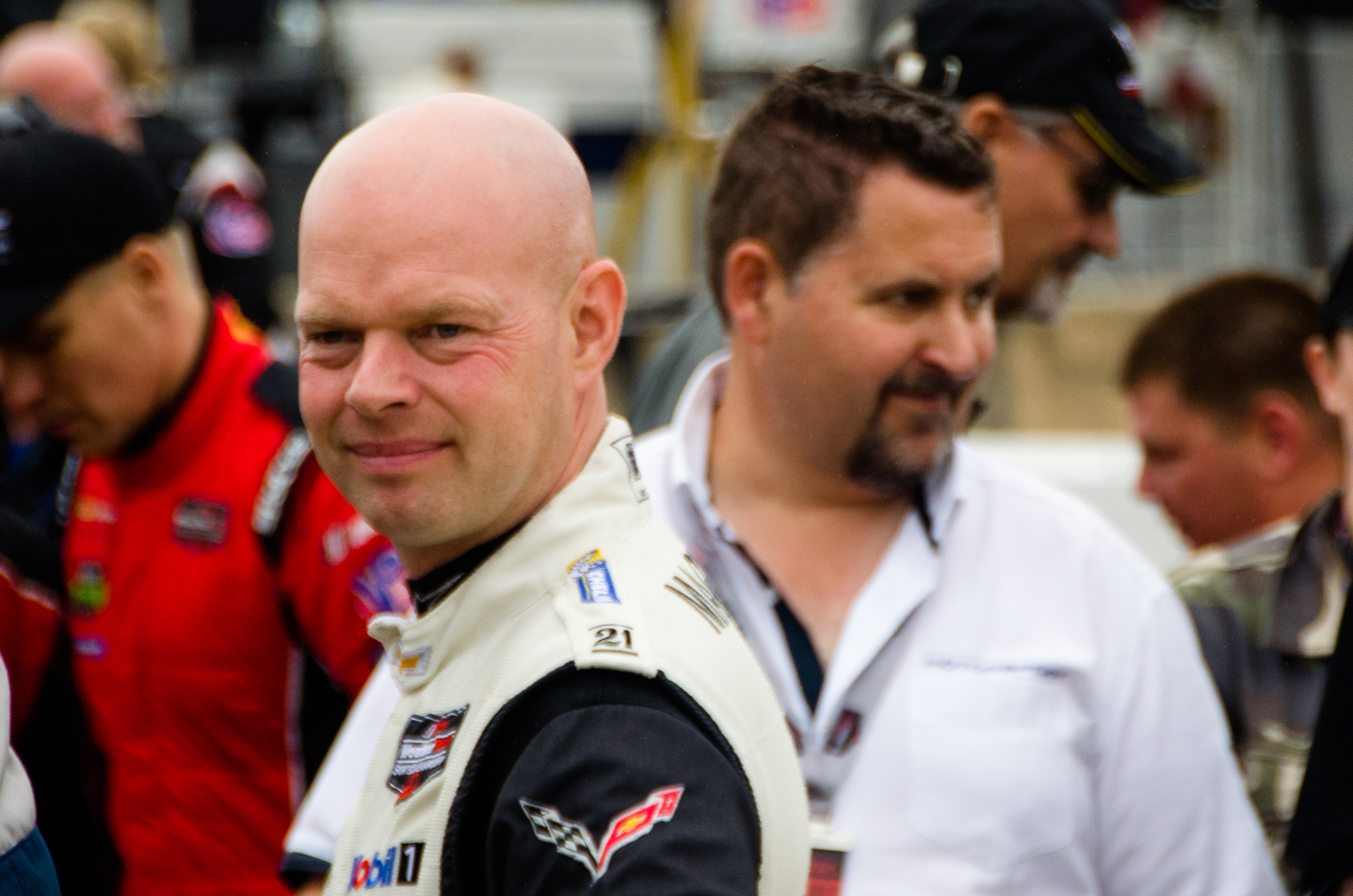 Jan Magnussen - Petit Le Mans 2017